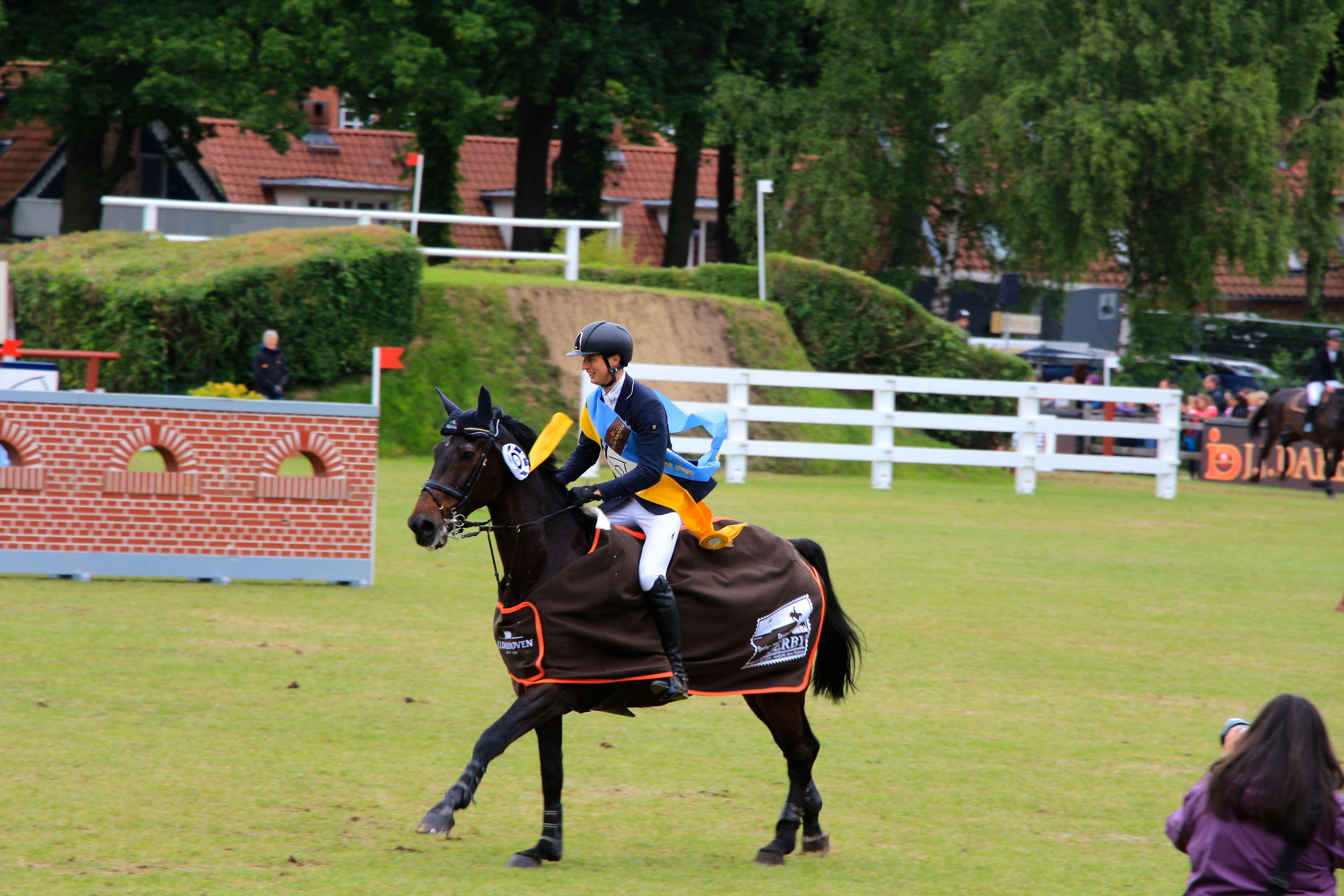 Sieger des 85. Deutschen Spring-Derbys in Klein Flottbek